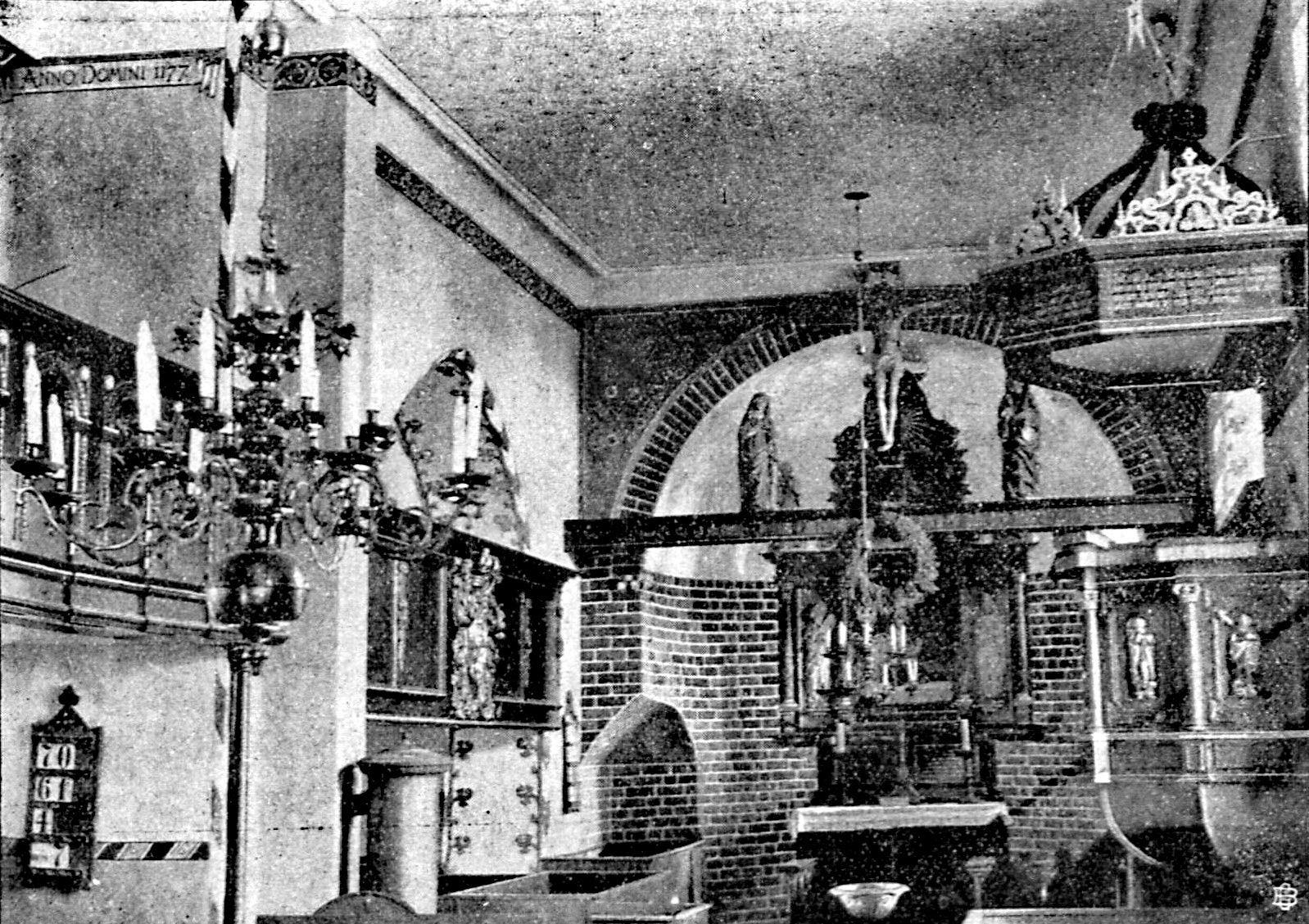 Die Kirche zu Rensefeld, Blick in die Apsis